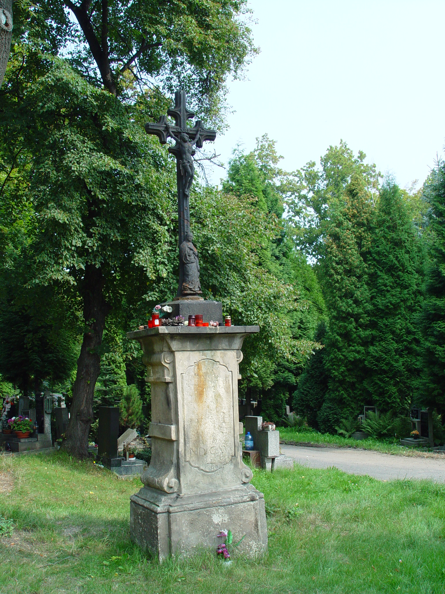 Kříž se Šimonem a Judou ze Slatinic přenesený ze zaniklé obce na starý hřbitov v Mostě